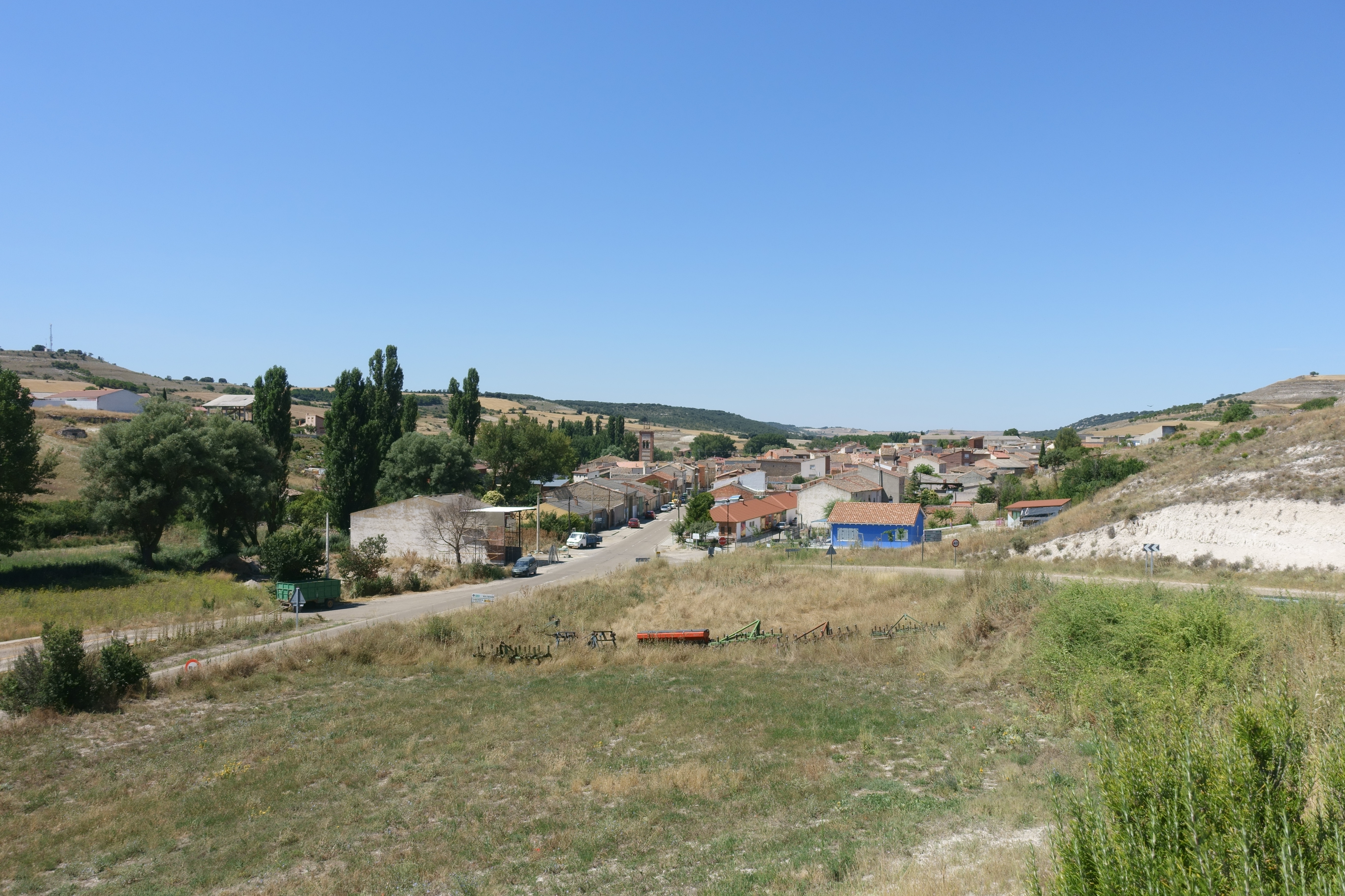 Vista general de Antigüedad (Palencia, España).